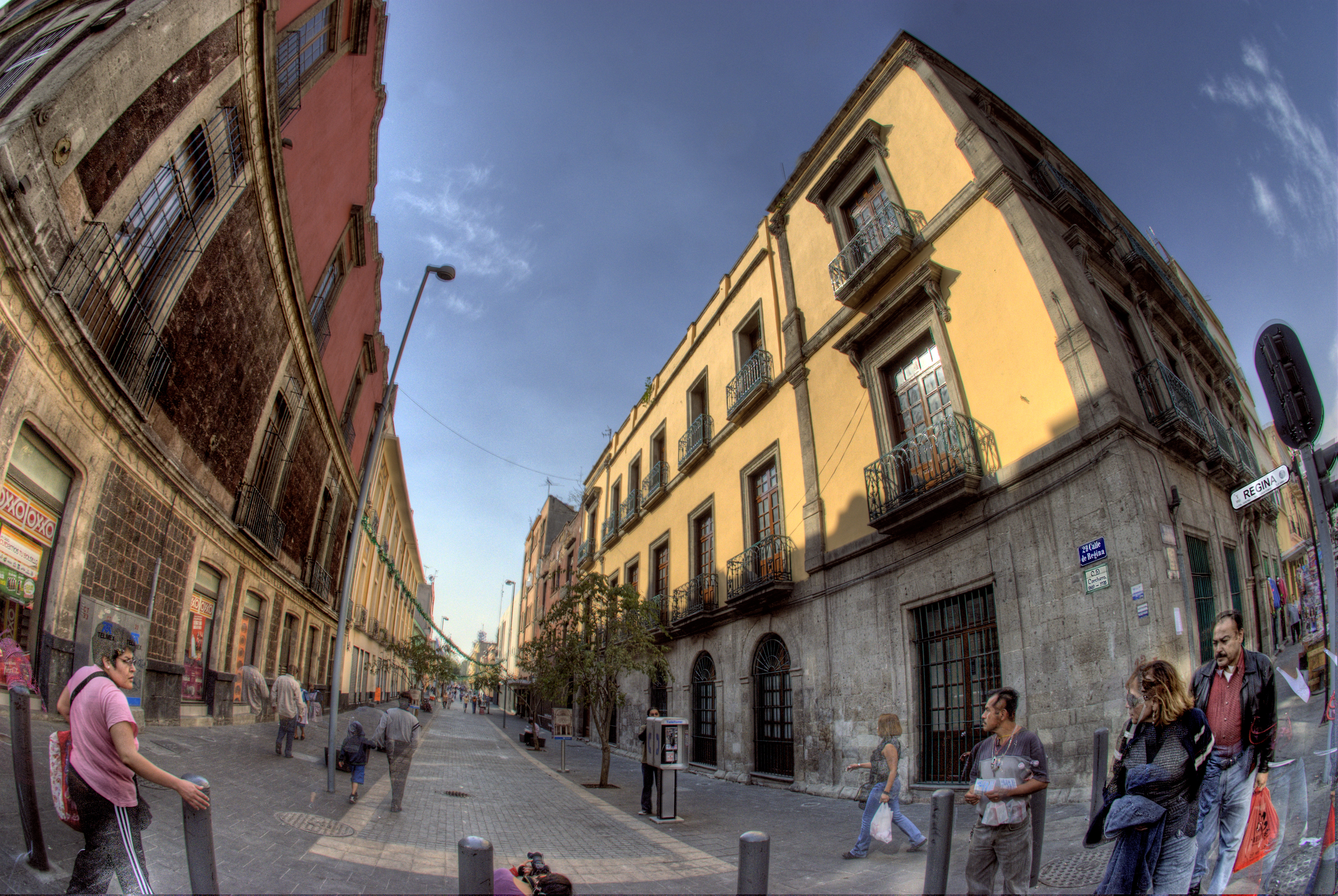 Calle Regina